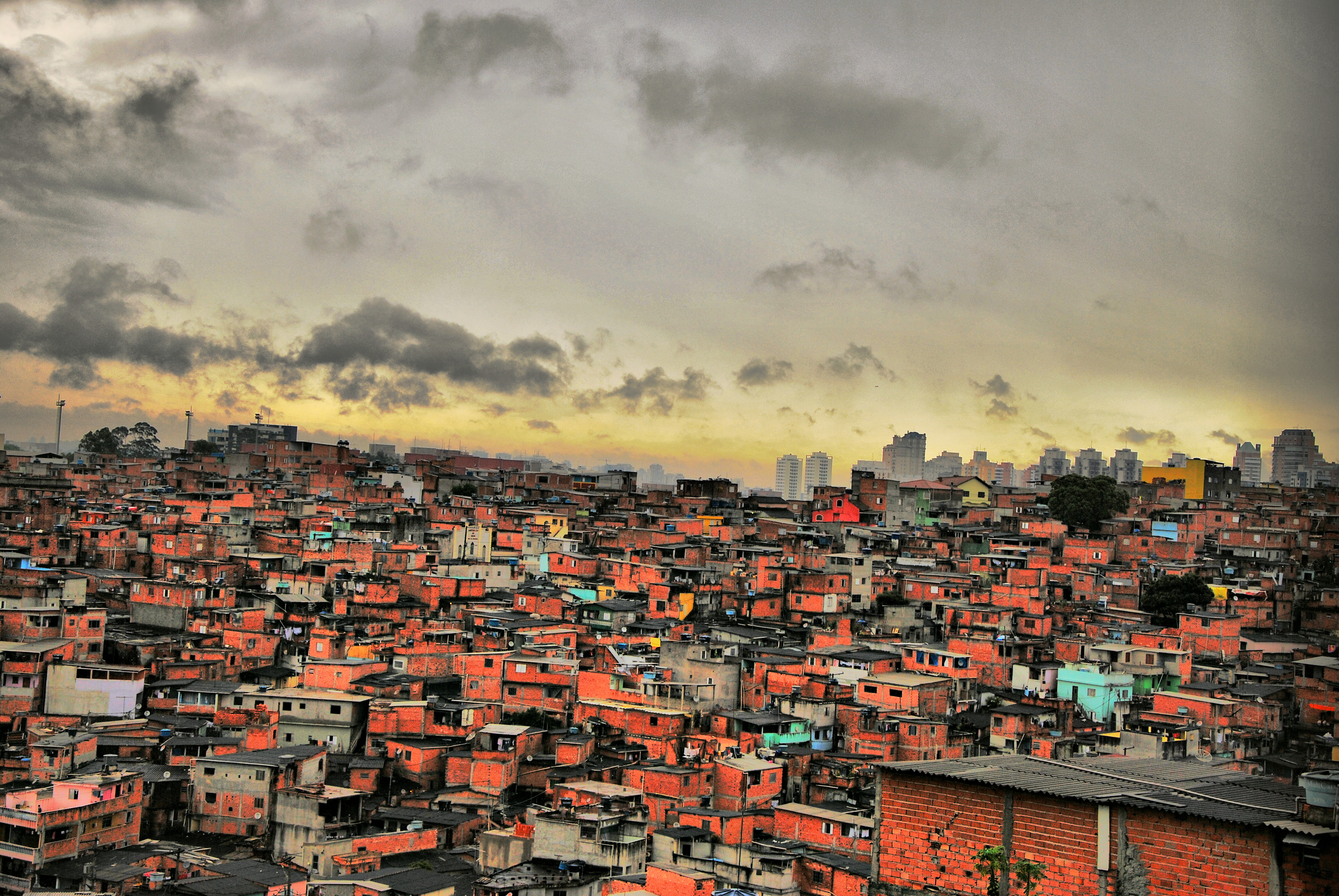 Vista da Favela Paraisopolis em 2014. Foto por Roberto Rocco (TU Delft).